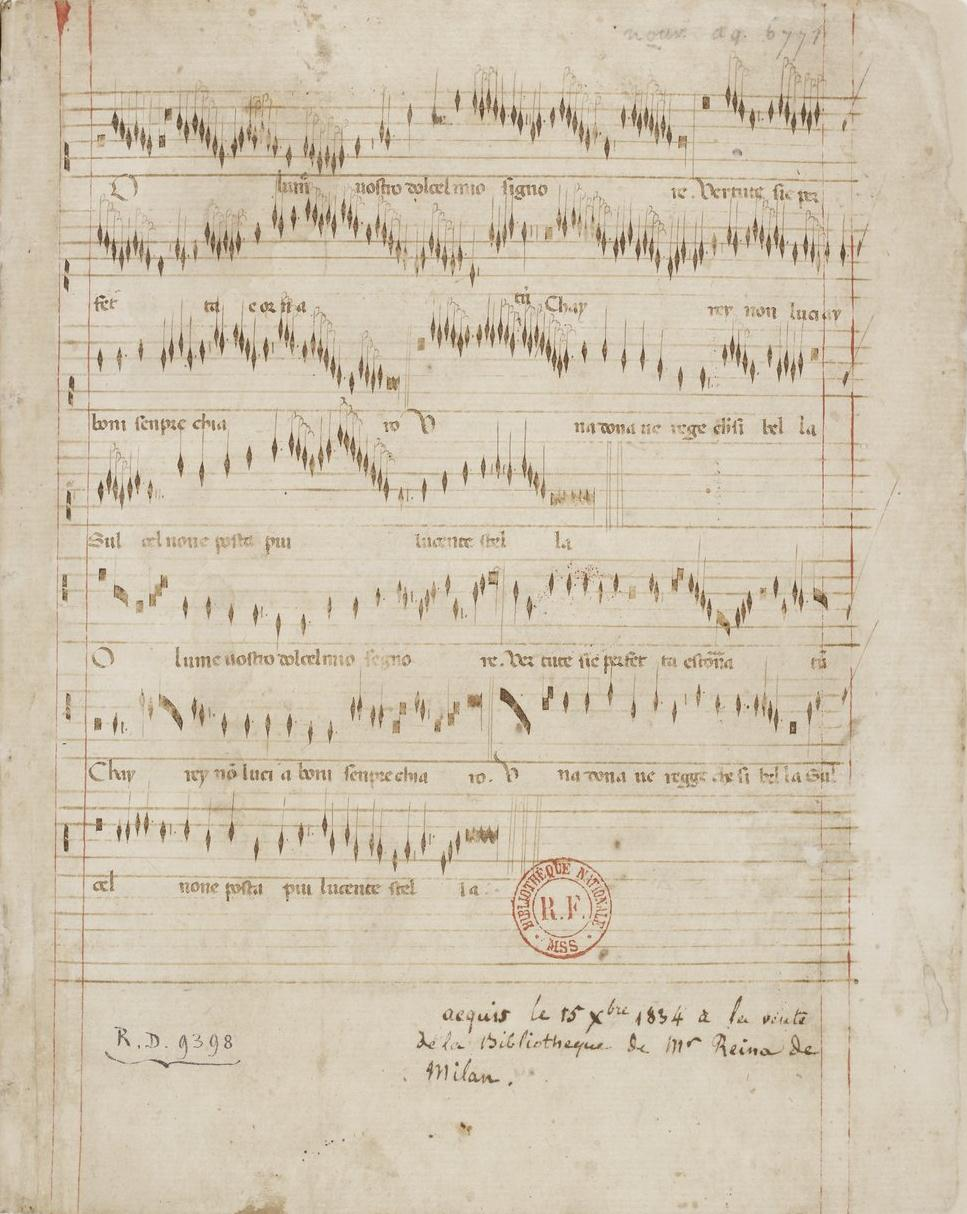 Codex Reina, first folio